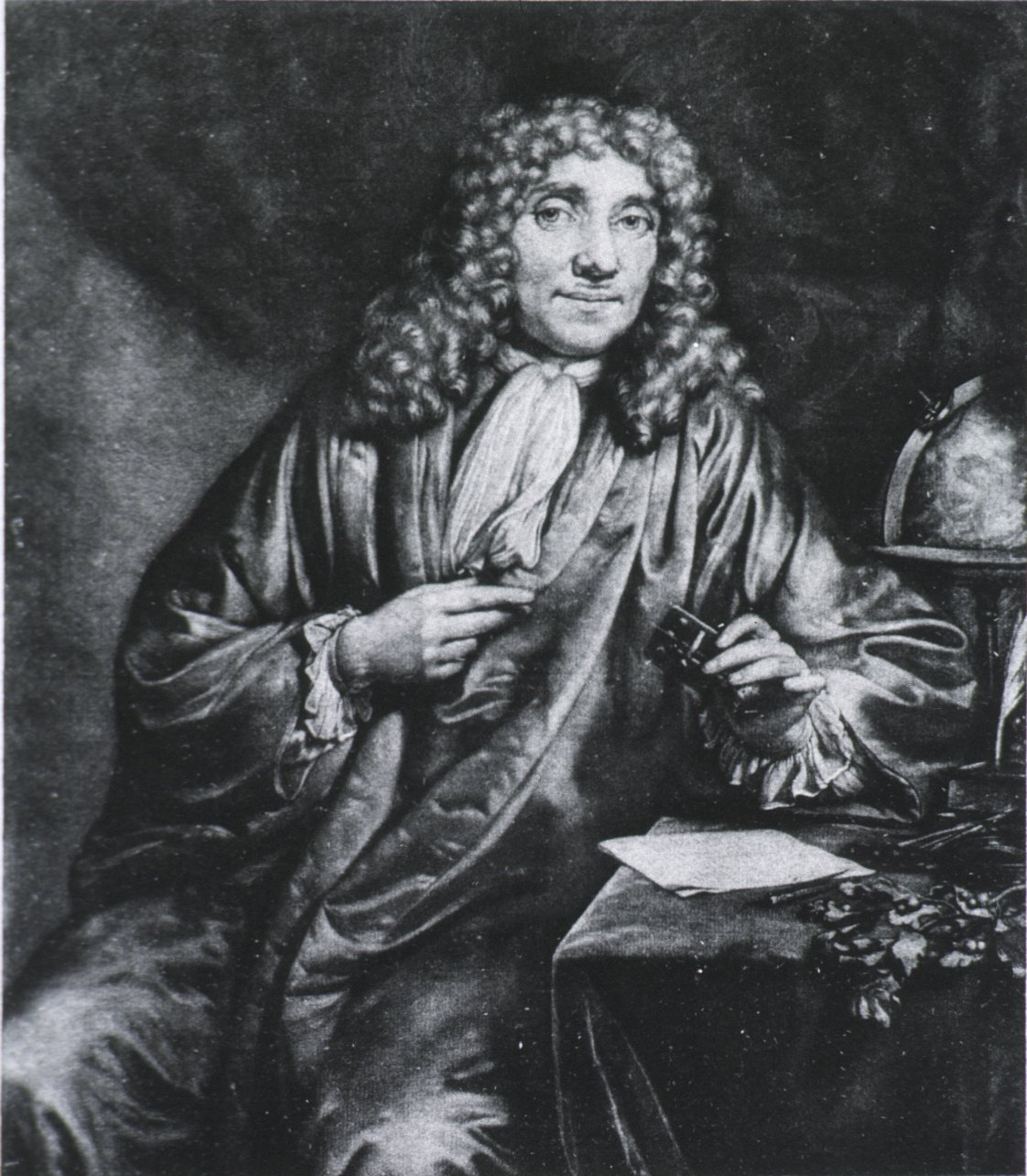 Portrait of Antoni van Leeuwenhoek (1632—1723).